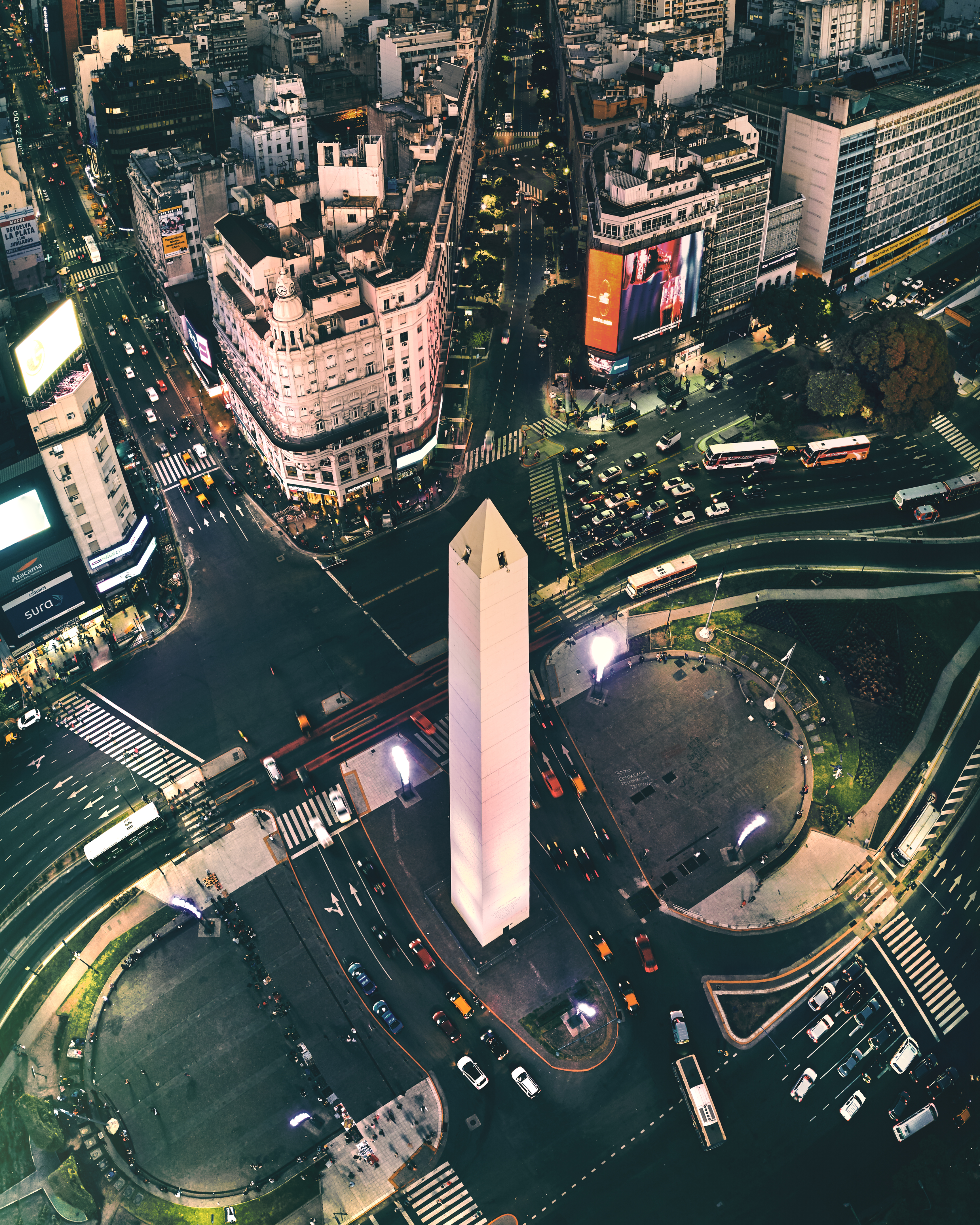 Obelisco de Buenos Aires